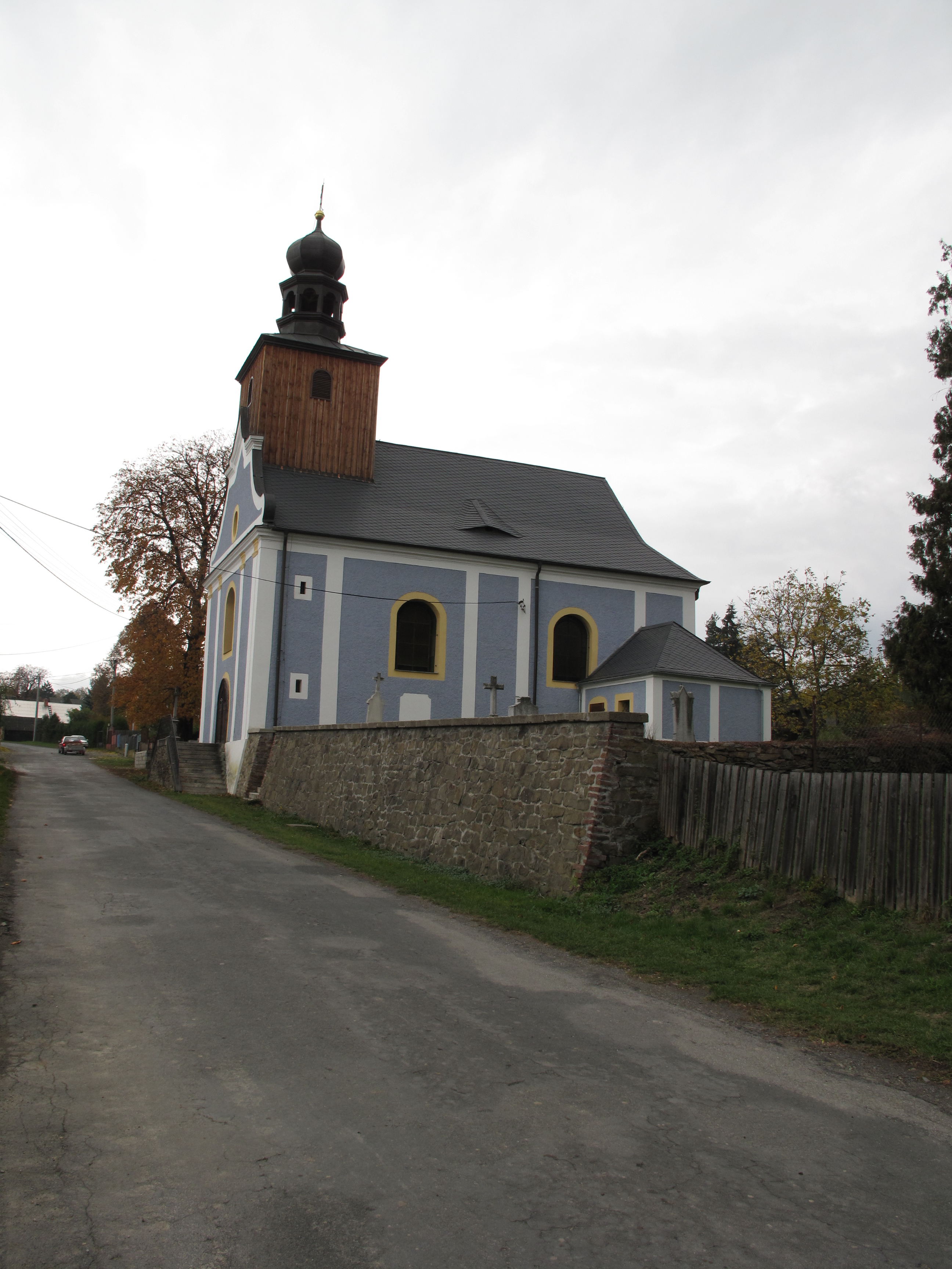 Býkov-Láryšov. Okres Bruntál, Česká republika.